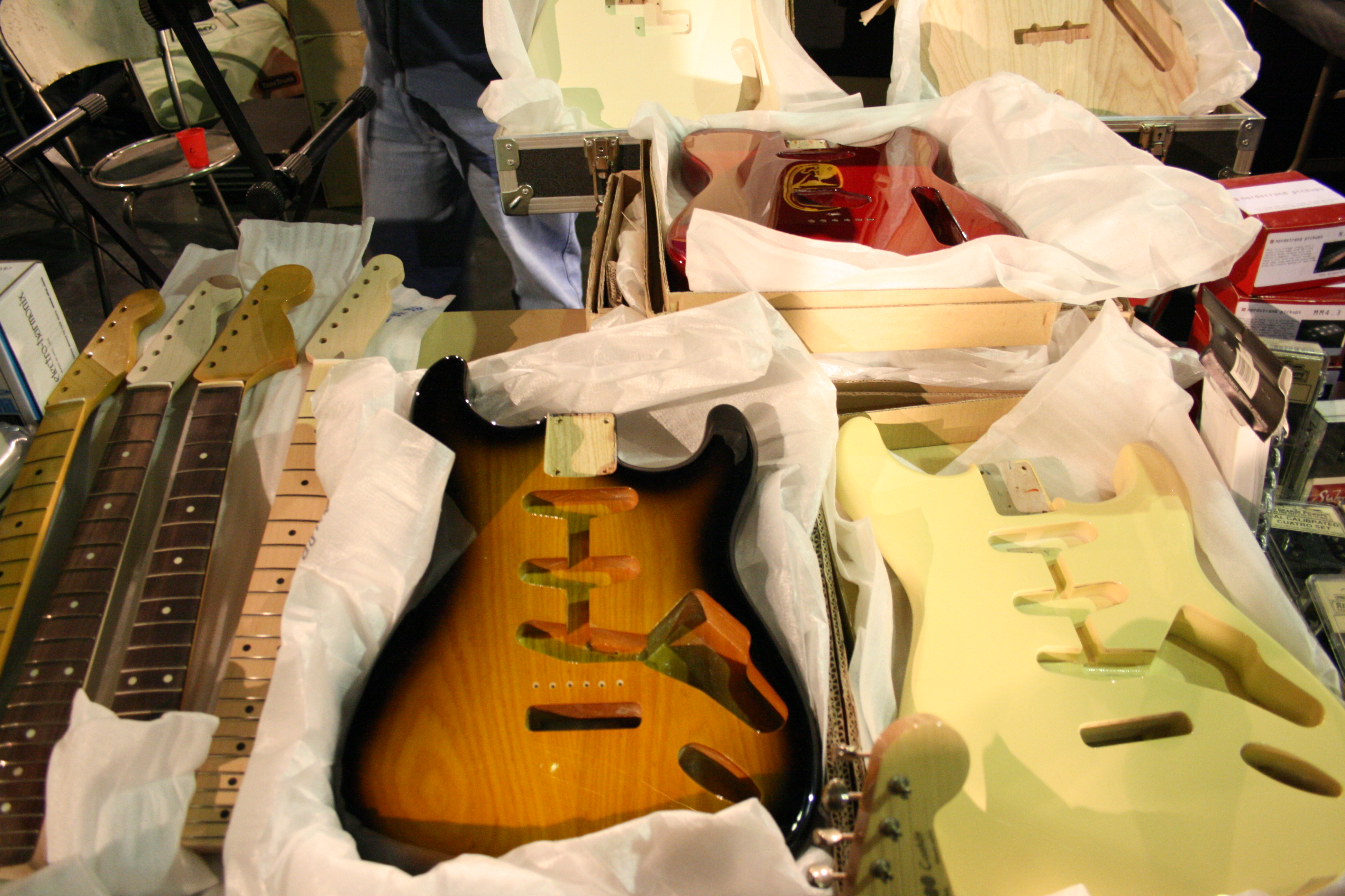 Prima della musica